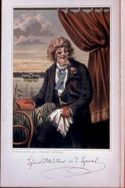 Emil Jacobsen als Hunold Müller von der Havel. Frontispiz im Äolsharfenkalender 1886